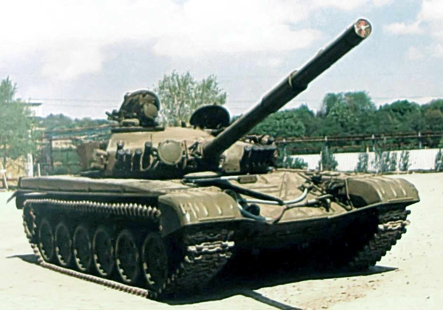 reprodukcia: stredný tank T-72 M1 vo výzbroji Armády Slovenskej republiky